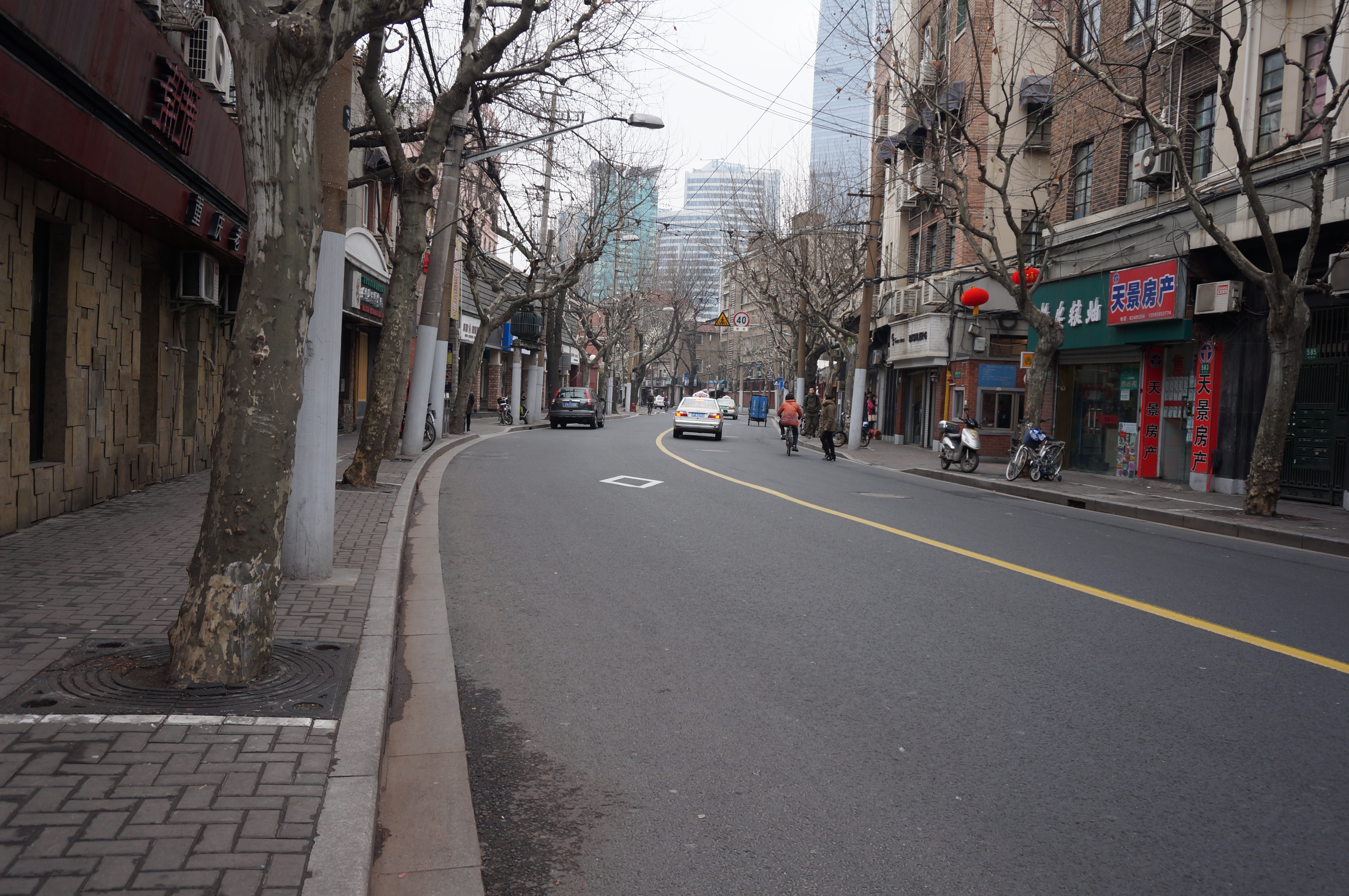 中文（中国大陆）: 愚园路中实新村附近街景